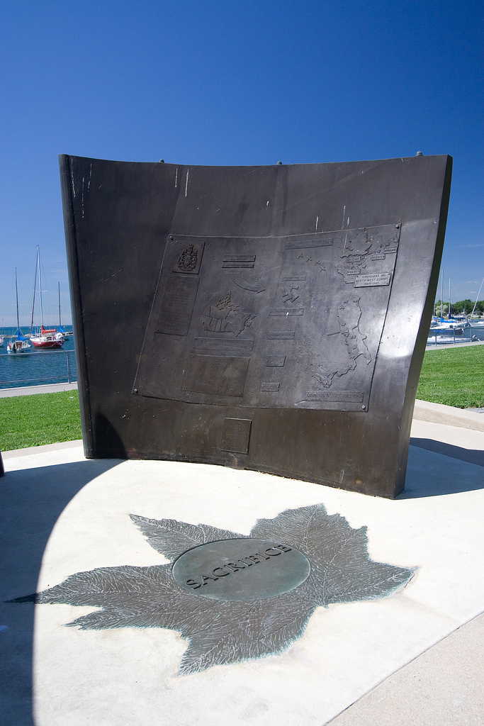 Monument